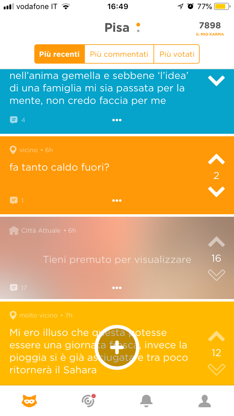 Screenshot creato da me su schermata principale di Jodel